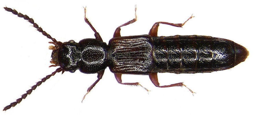 Familie: Staphylinidae Groesse: 4,5-5 mm Verbreitung: Europa Ökologie: unter der Rinde alter Laubhölzer Photo: U.Schmidt, 2006